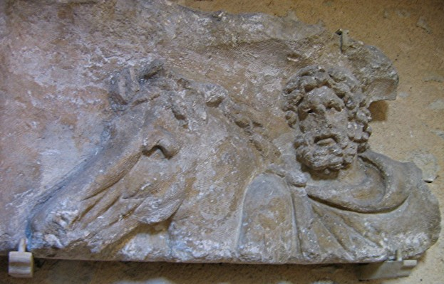 Musée de Sens, Yonne, France : bas-relief gallo-romain représentant Castor